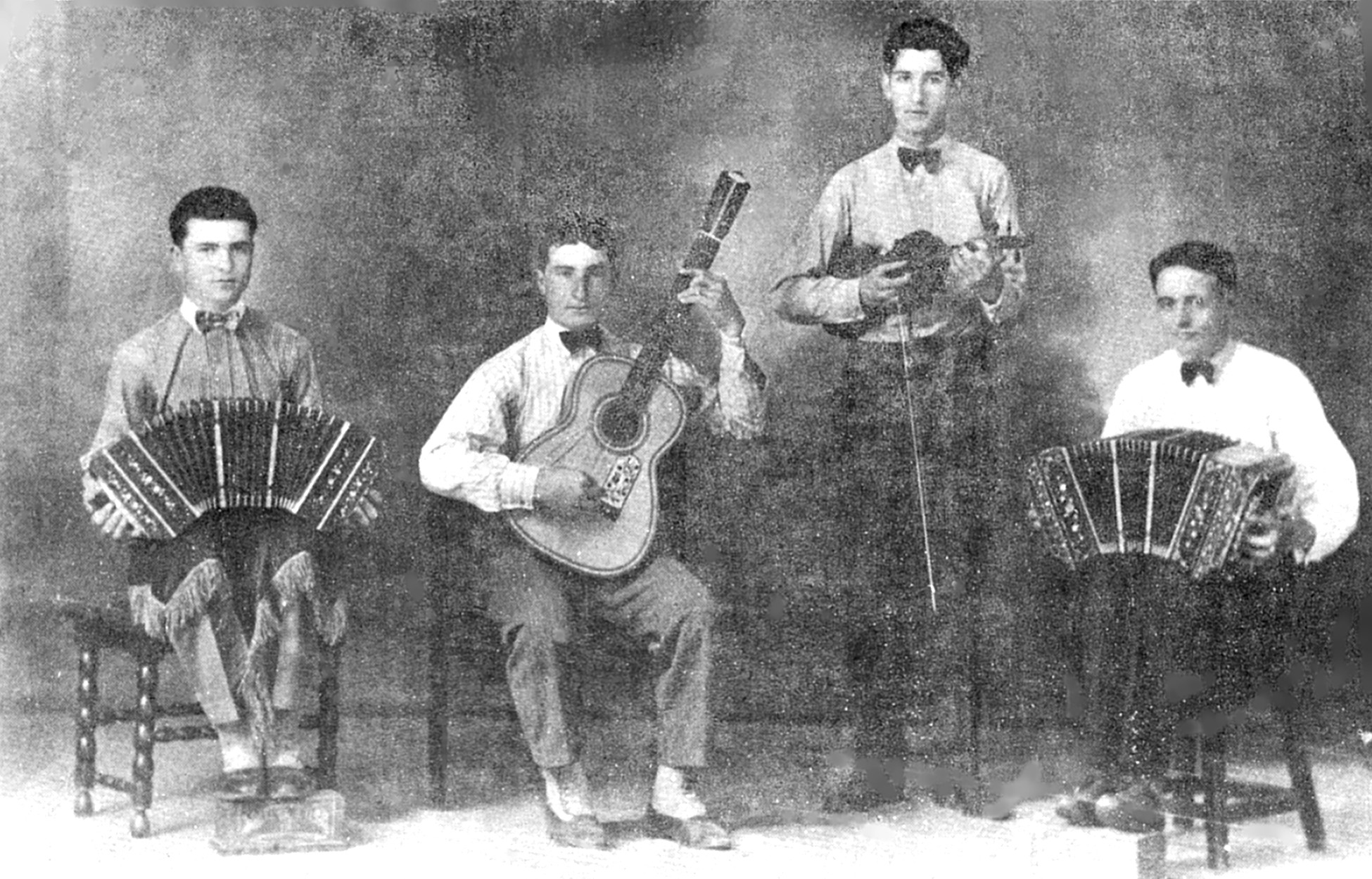 Cuarteto integrado por (de izquierda a derecha): Aurelio Rodríguez (bandoneón), Tomás Di Pierro (guitarra), Pedro Aloisi (violín) y Gregorio Soto (bandoneón). Año 1929, Junín, Argentina.